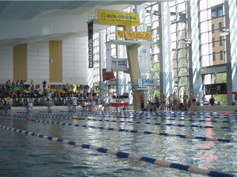 Elbe-Schwimmhalle Magdeburg